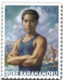 Skanita kaj rotaciita bildo pri usona poŝtmarko el 2002, devenante de publike kopiebla retbildo de la usona poŝto